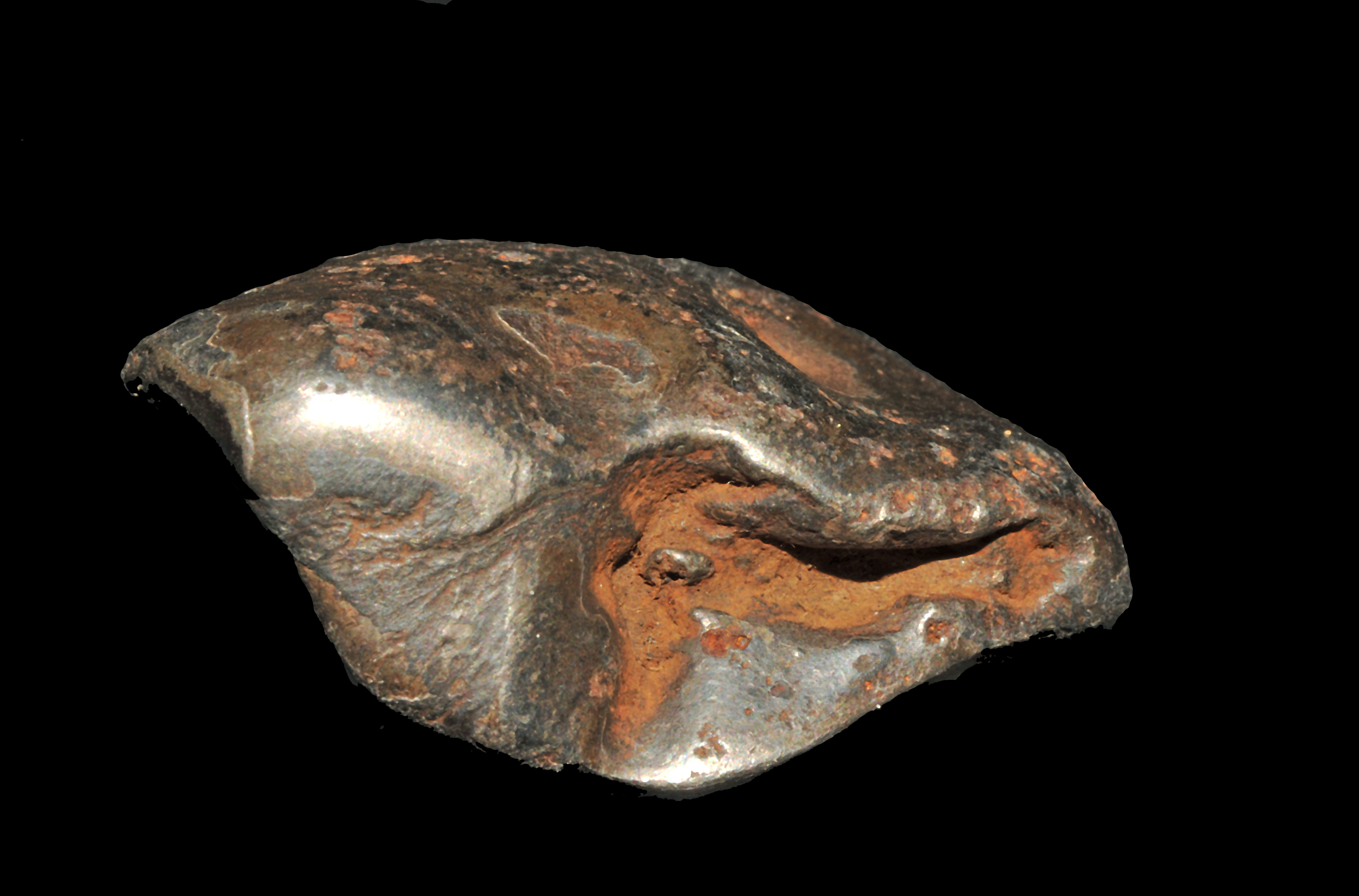 météorite Sikhote-Alin - Russie 30/06/47